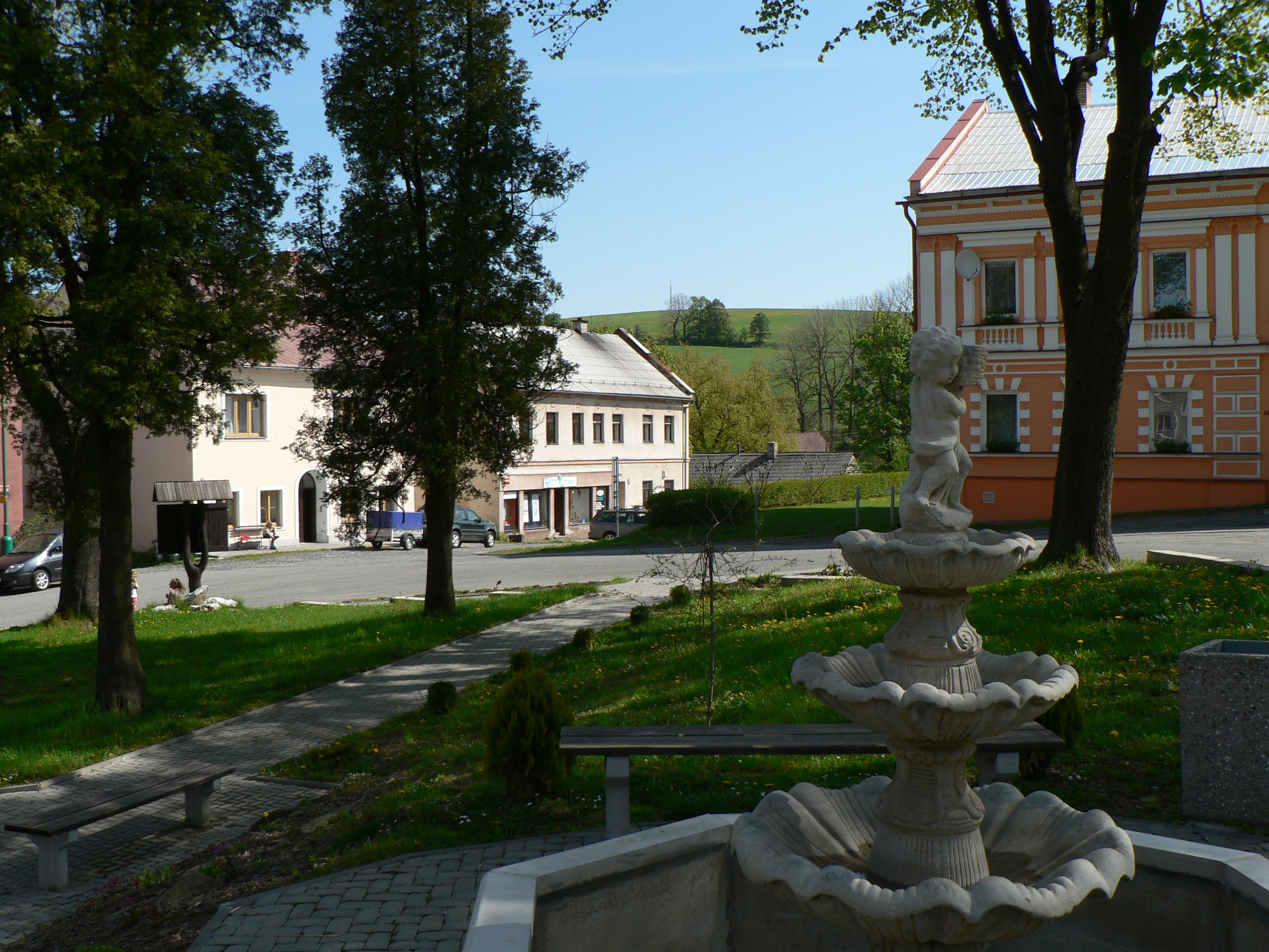 Náměstí v Rýžovišti